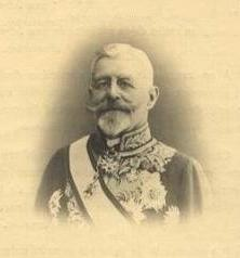 Constant Goffinet (1857-1931), intendant de la liste civile du roi Léopold II.